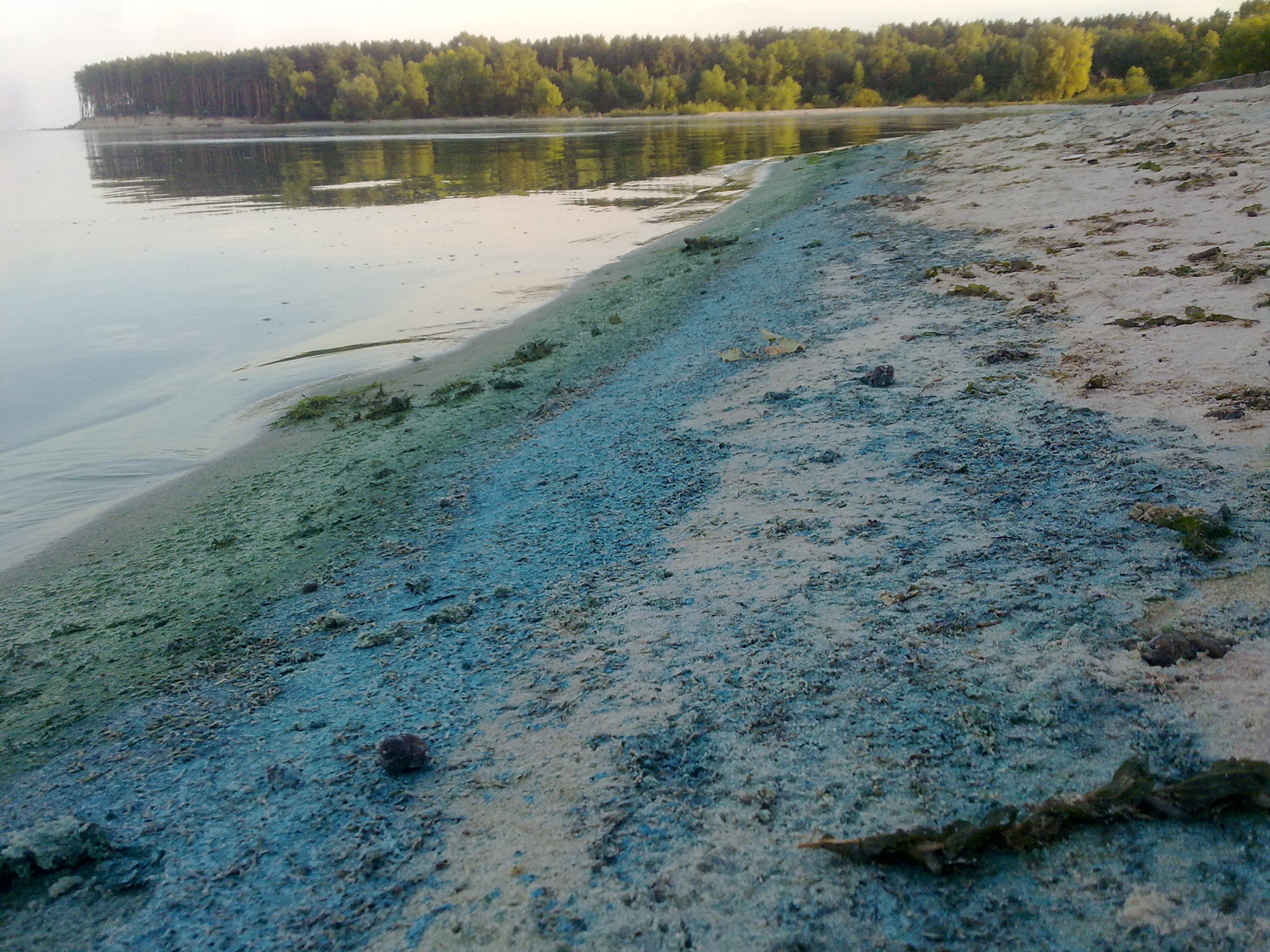 Синезелёные водоросли, высохшие на берегу Киевского водохранилища